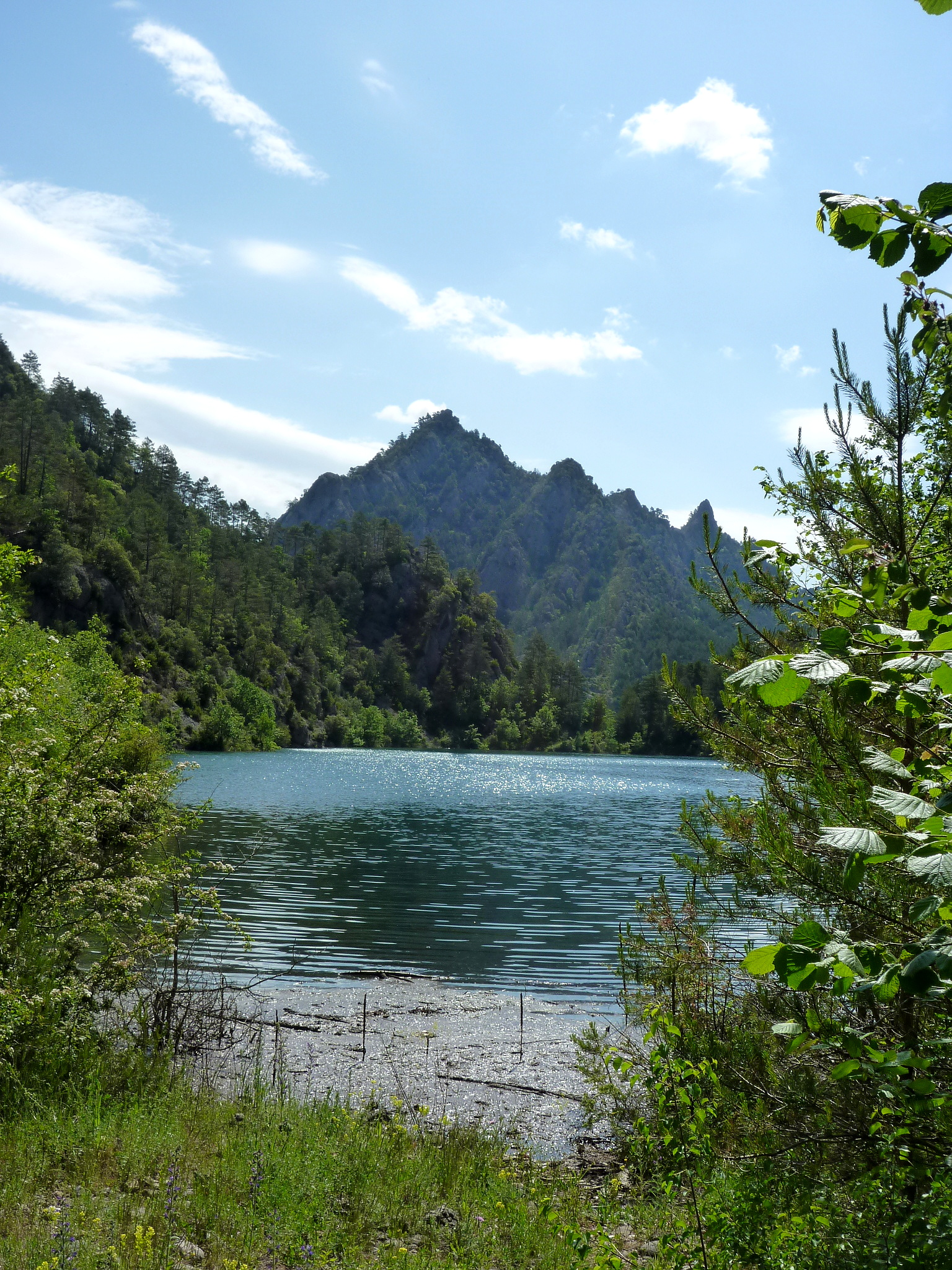 Punt on desguassa la riera de Sobirana a les aigües del pantà de la Llosa del Cavall. Els Llengots al fons. Guixers (Solsonès - Catalunya)